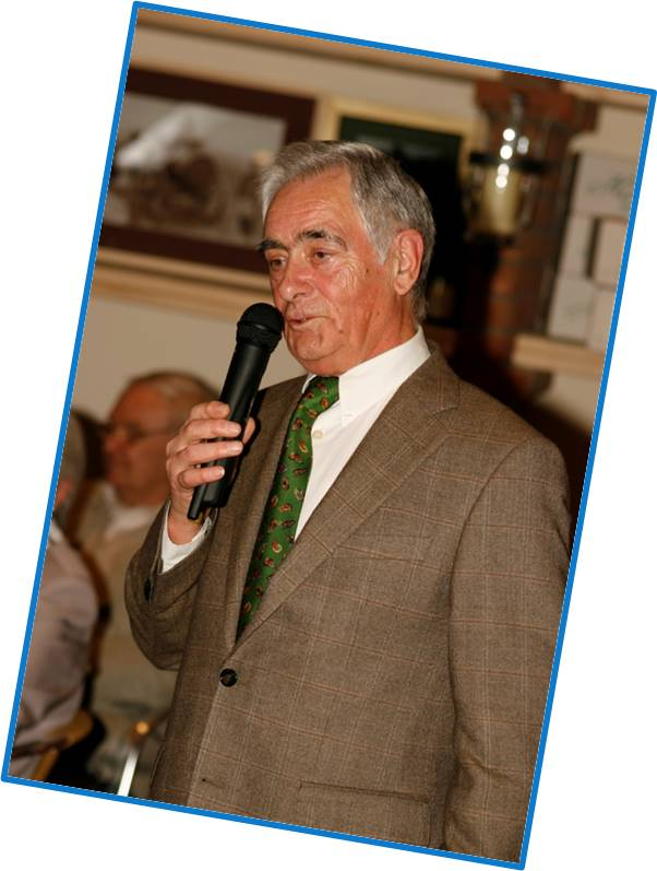 Rede2008